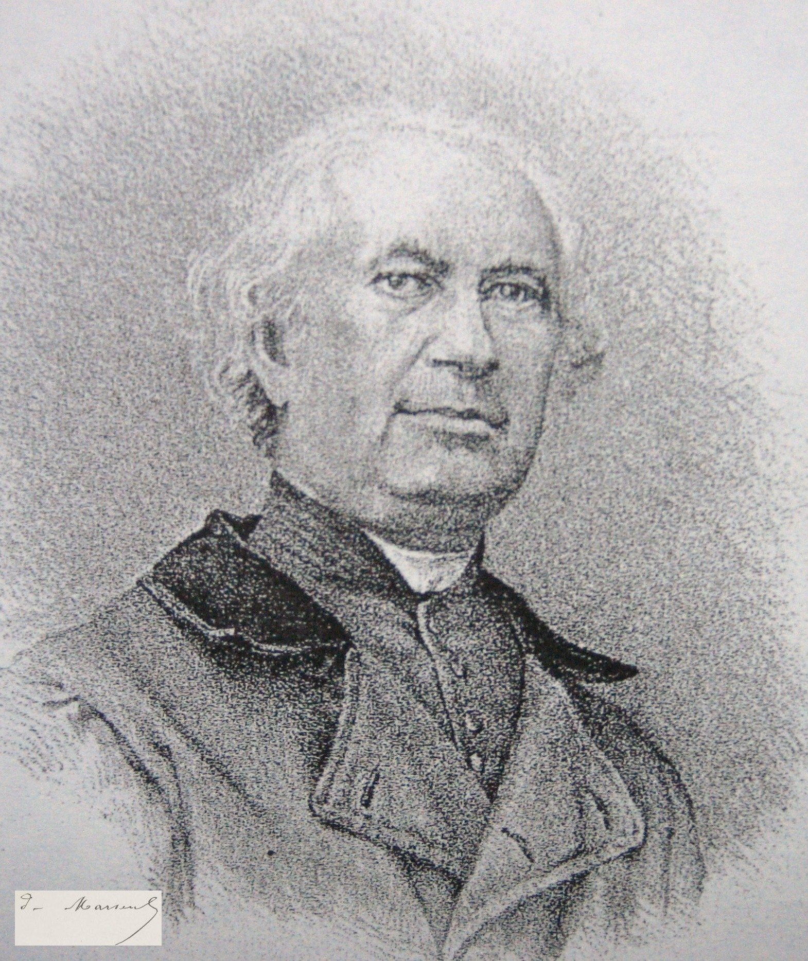 Portrait de Sylvain-Augustin de Marseul, Entomologiste français.